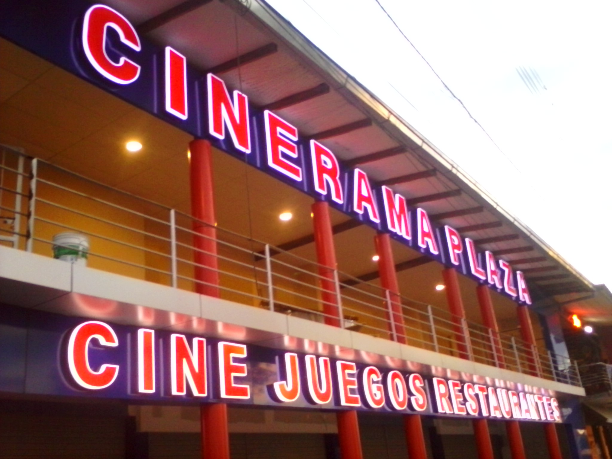 Frontis de Cinerama Plaza en la ciudad de Moyobamba